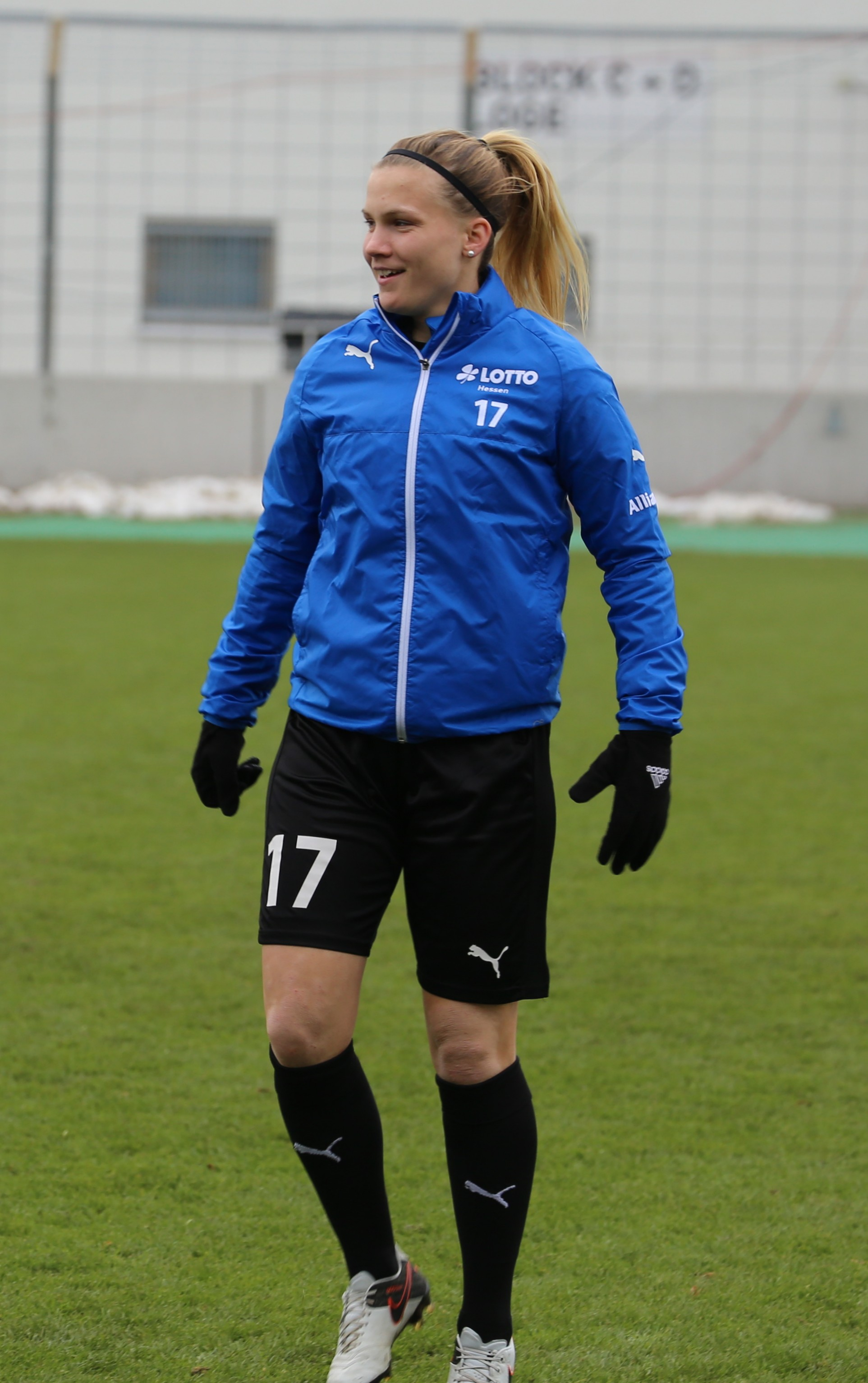 Nadine Anstatt (1. FFC Frankfurt) beim Aufwärmen vor dem Frauen-Bundesliga-Spiel FC Bayern München gegen 1. FFC Frankfurt am 13. November 2016 im Stadion an der Grünwalder Straße, München (Ergebnis war 1:0).